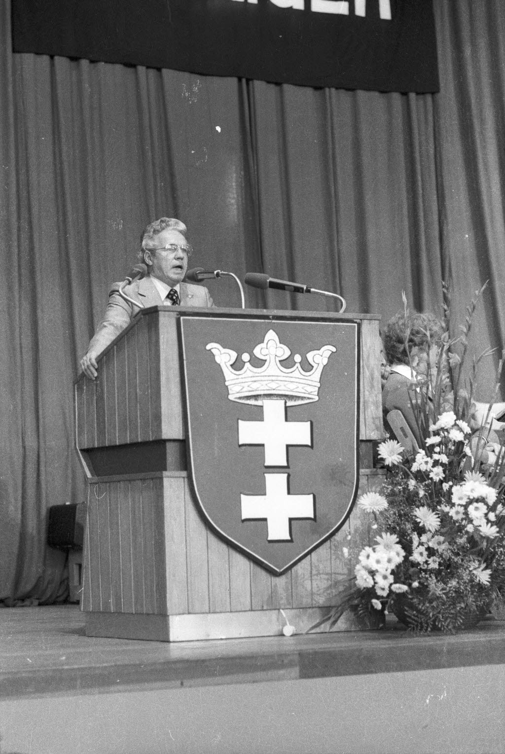 Treffen von Heimatvertriebenen mit 5.000 Teilnehmern.